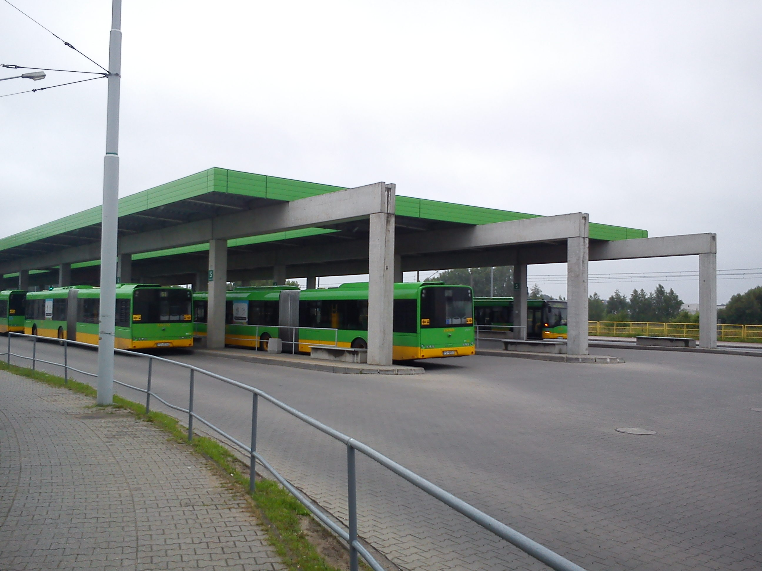 Dworzec autobusowy Jana III Sobieskiego, Poznań.